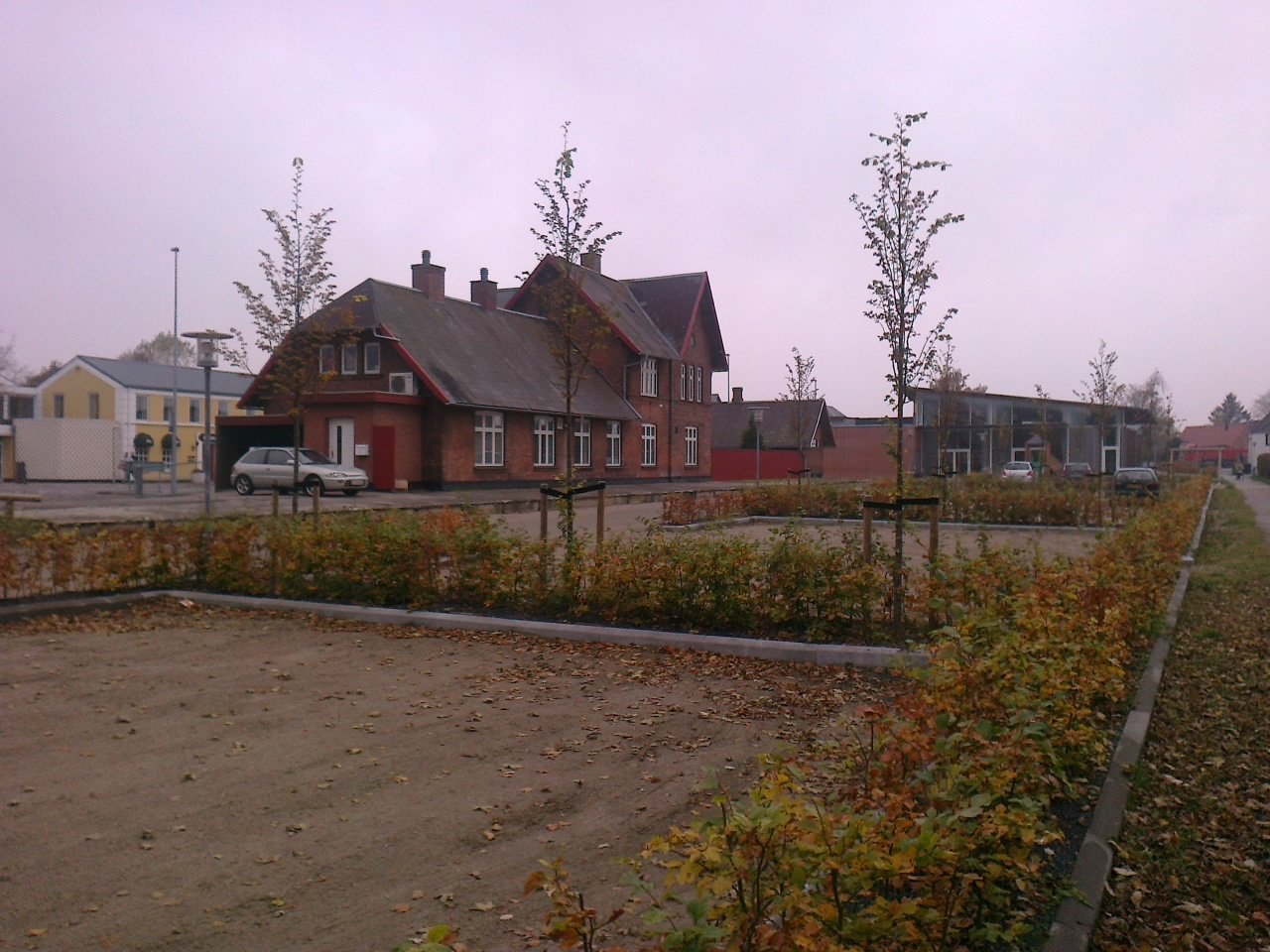 Auning station og Kulturperronen. I baggrunden Auning Kro.